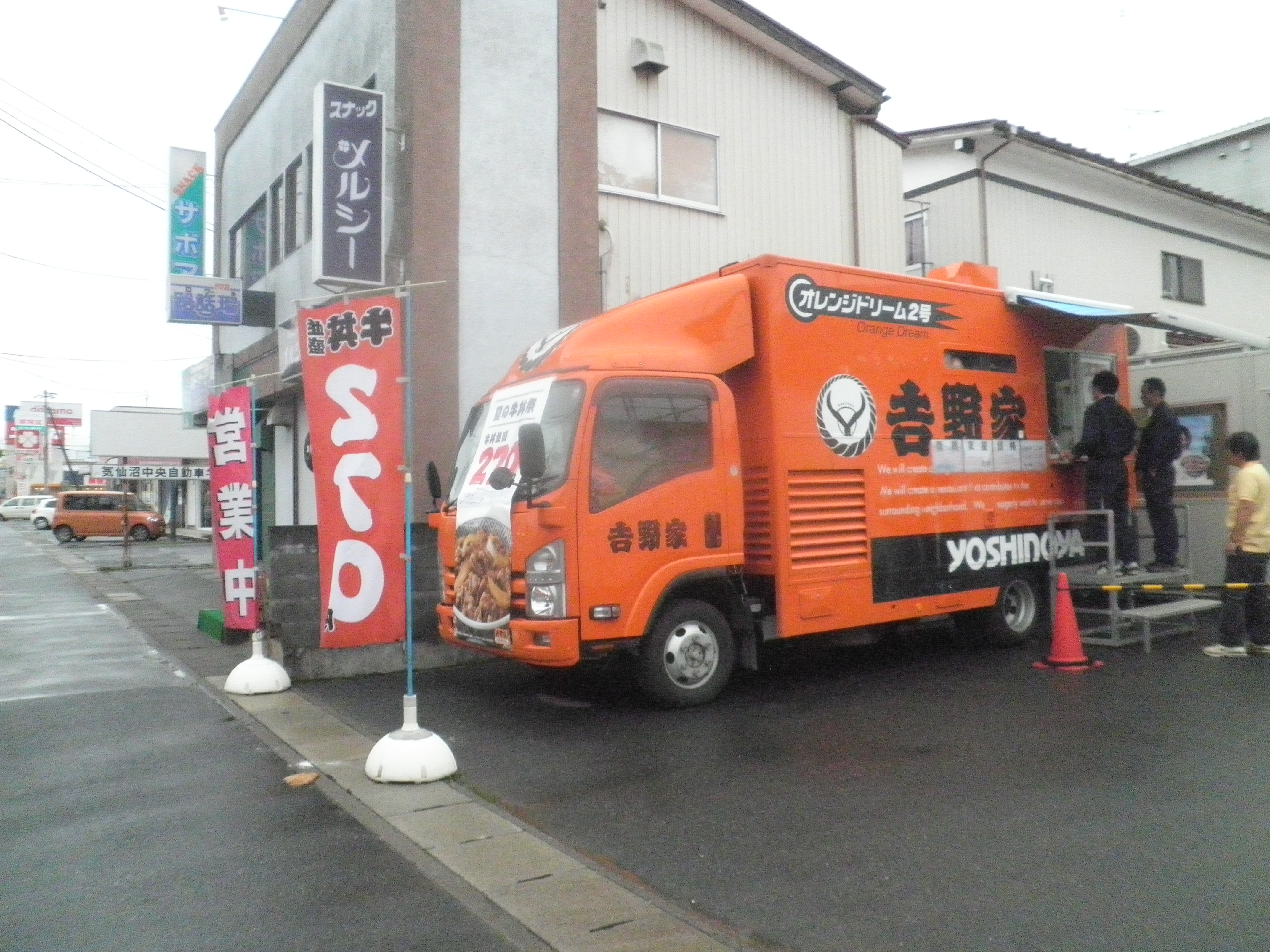 移動店舗での販売を行う吉野家気仙沼店